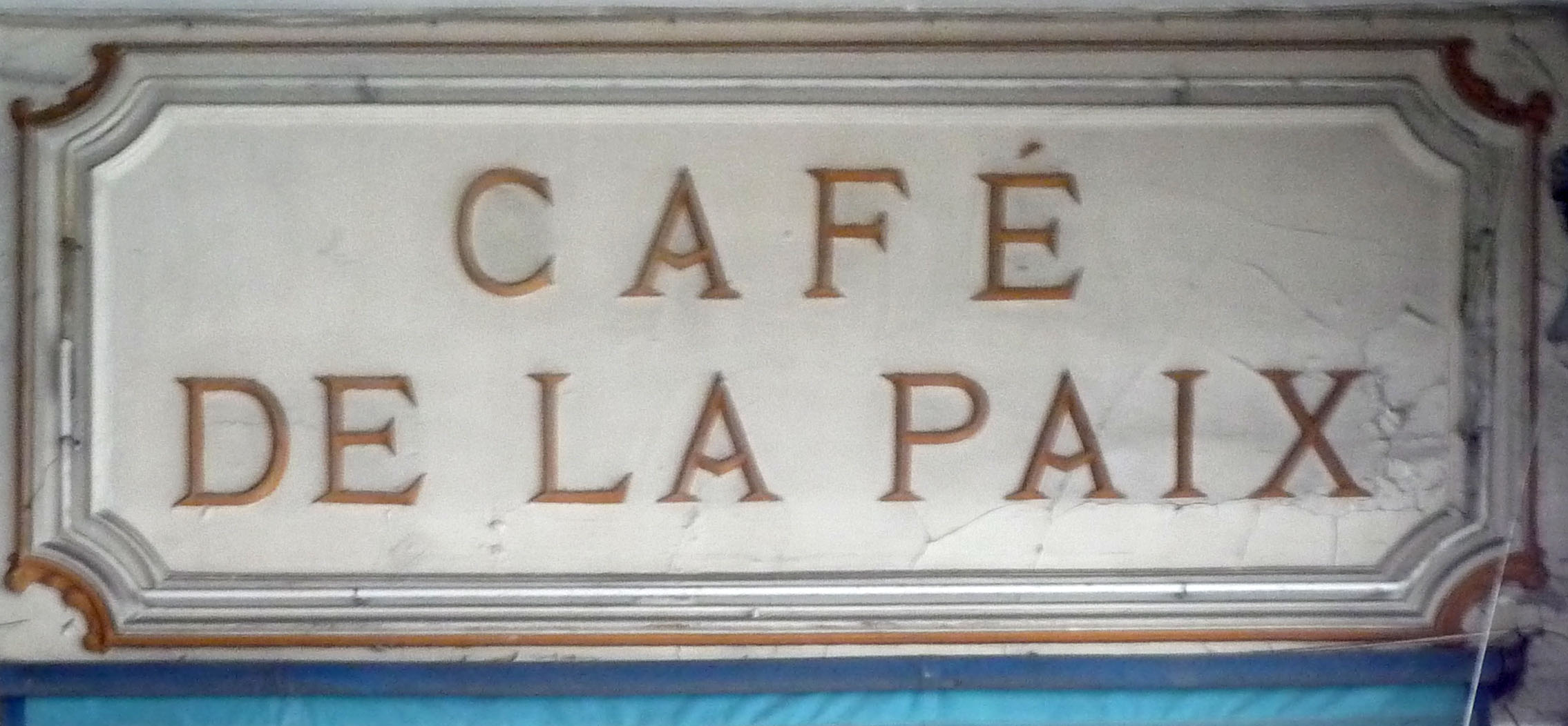 Cafe de la Paix 01